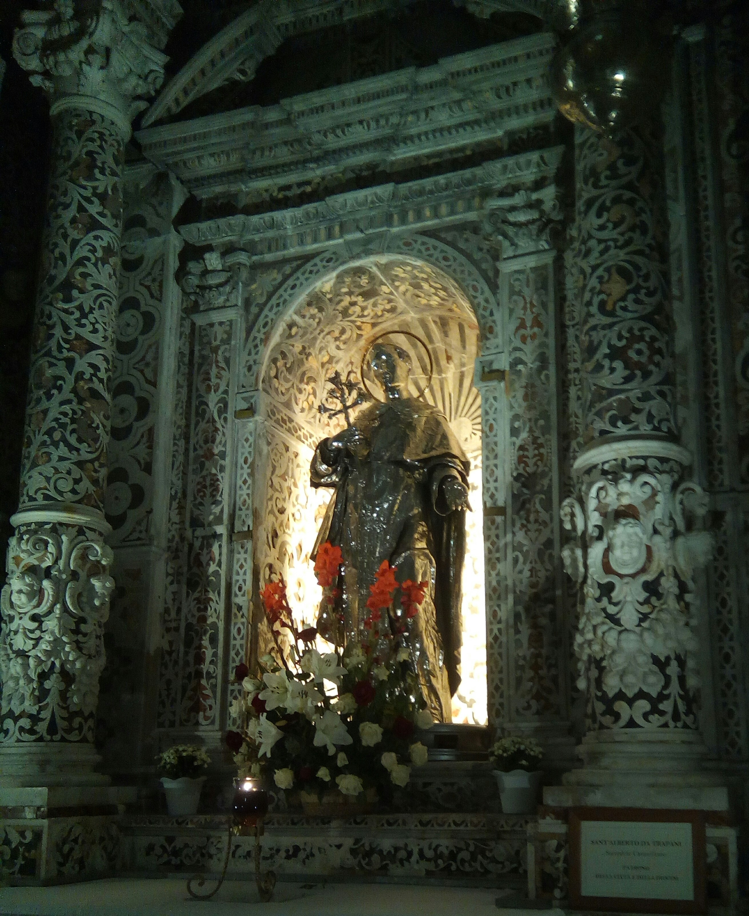 Statua reliquiario in argento di Sant'Alberto, carmelitano. Santuario dell'Annunziata, Trapani